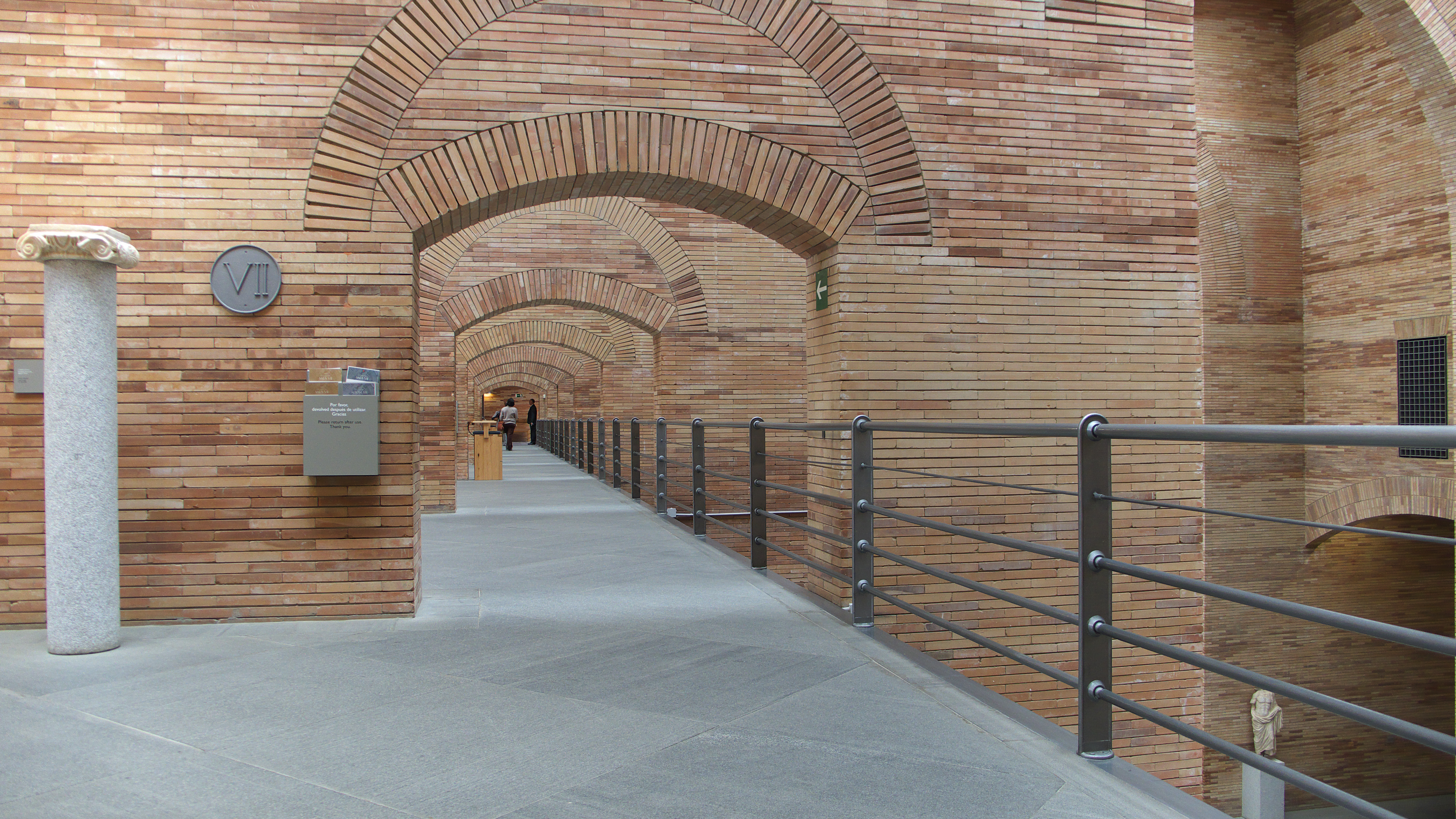 Las técnicas constructivas de Roma en la Mérida del siglo XX